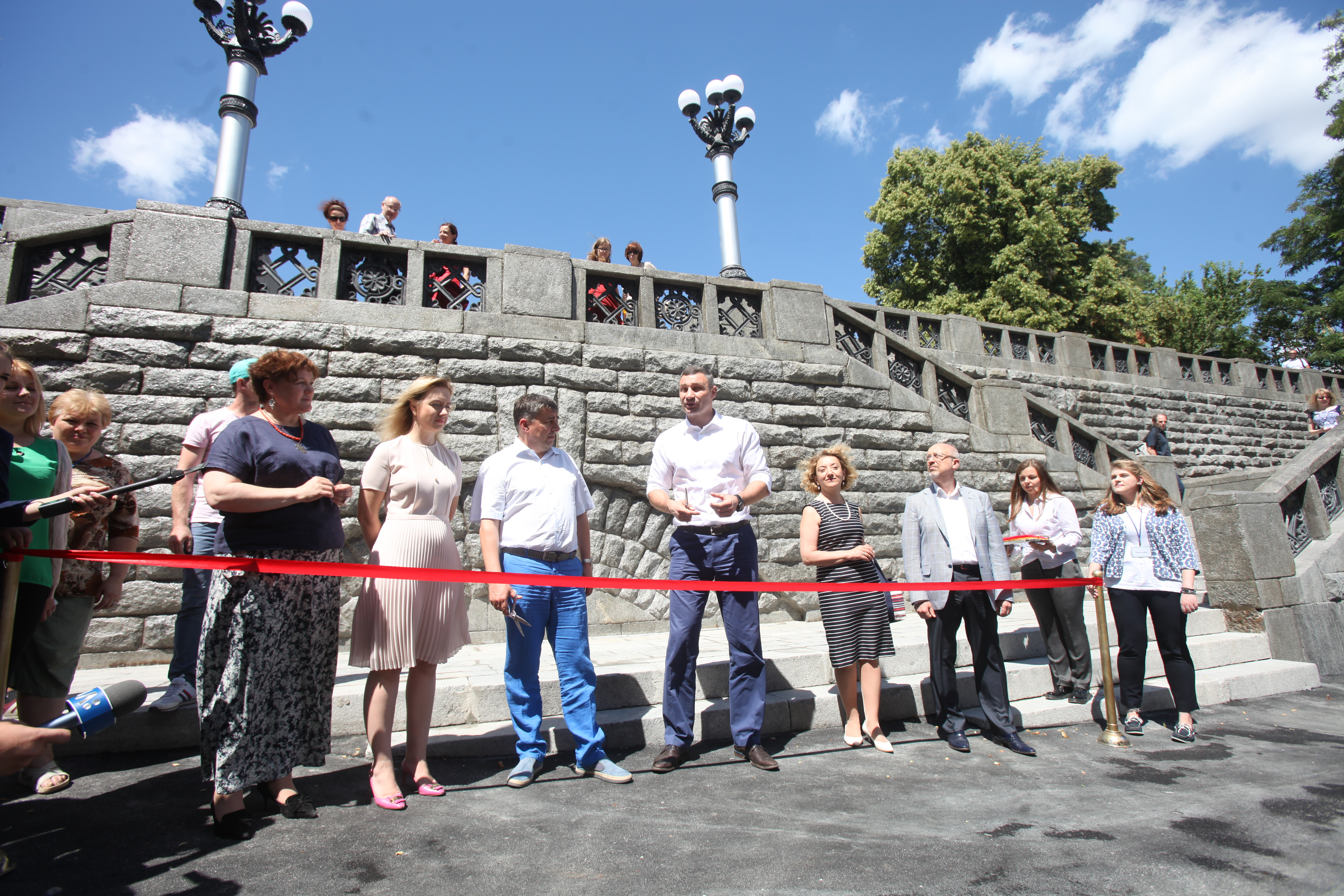 Відкриття першої черги реконструкції території Національного музею історії України (вхідна група). Стрічку перерізають Тетяна Сосновська, В'ячеслав Москалевський, Віталій Кличко, Марина Соловйова, Олексій Резніков.